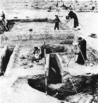 1930年殷墟发掘现场 照片来自《中国大百科全书》（简明版）金山词霸版